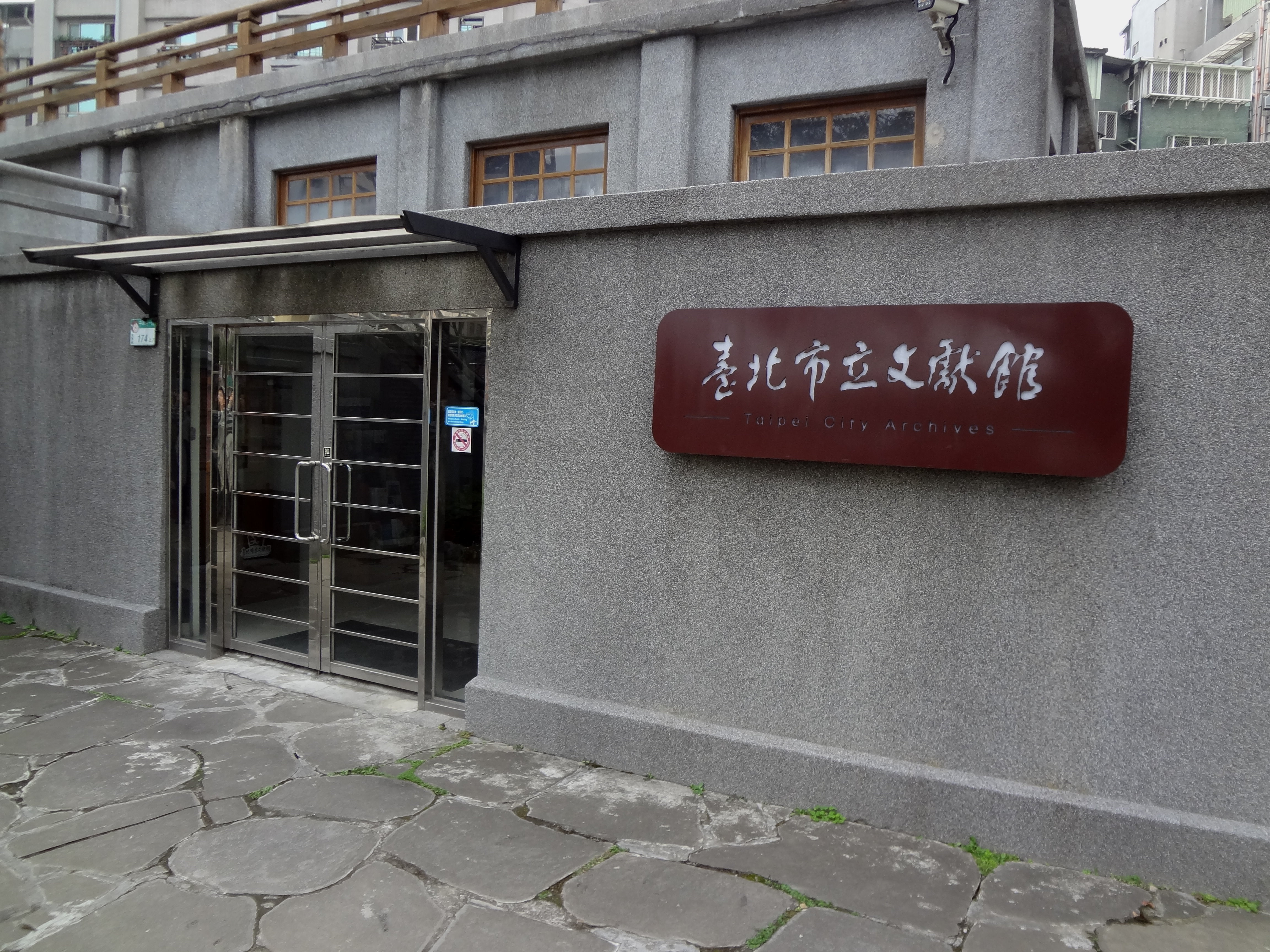 臺北市立文獻館，地址：臺北市萬華區中華路一段174之1號。